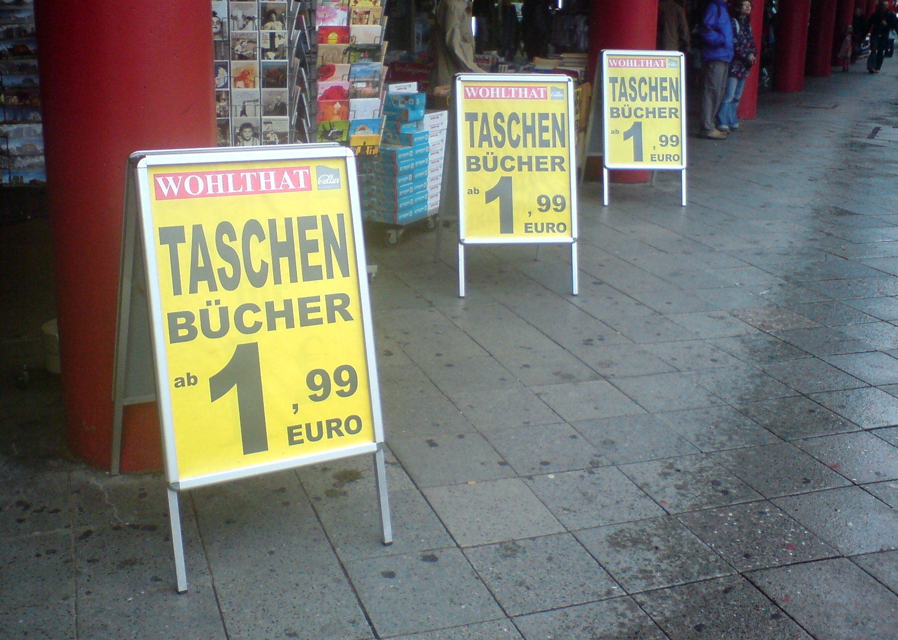 Kundenstopper vor einem Berliner Geschäft